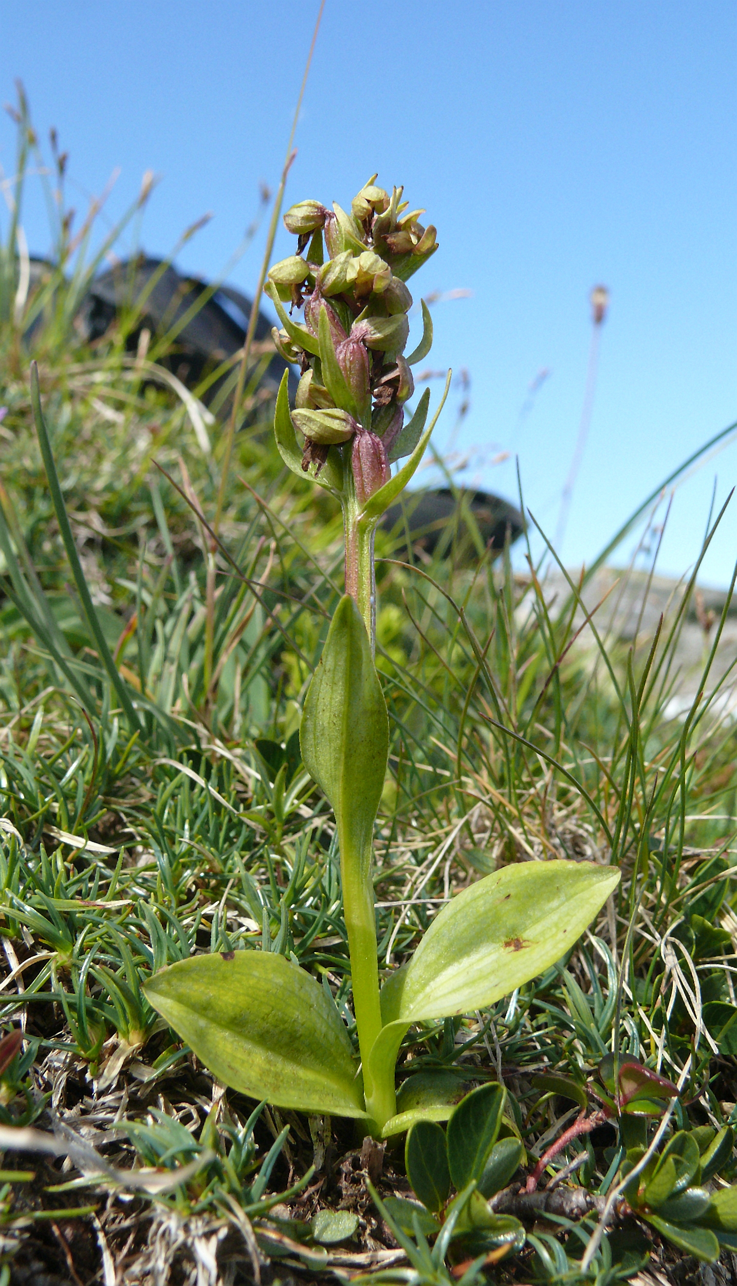 Coeloglossum viride, Allgäuer Alpen, Österreich